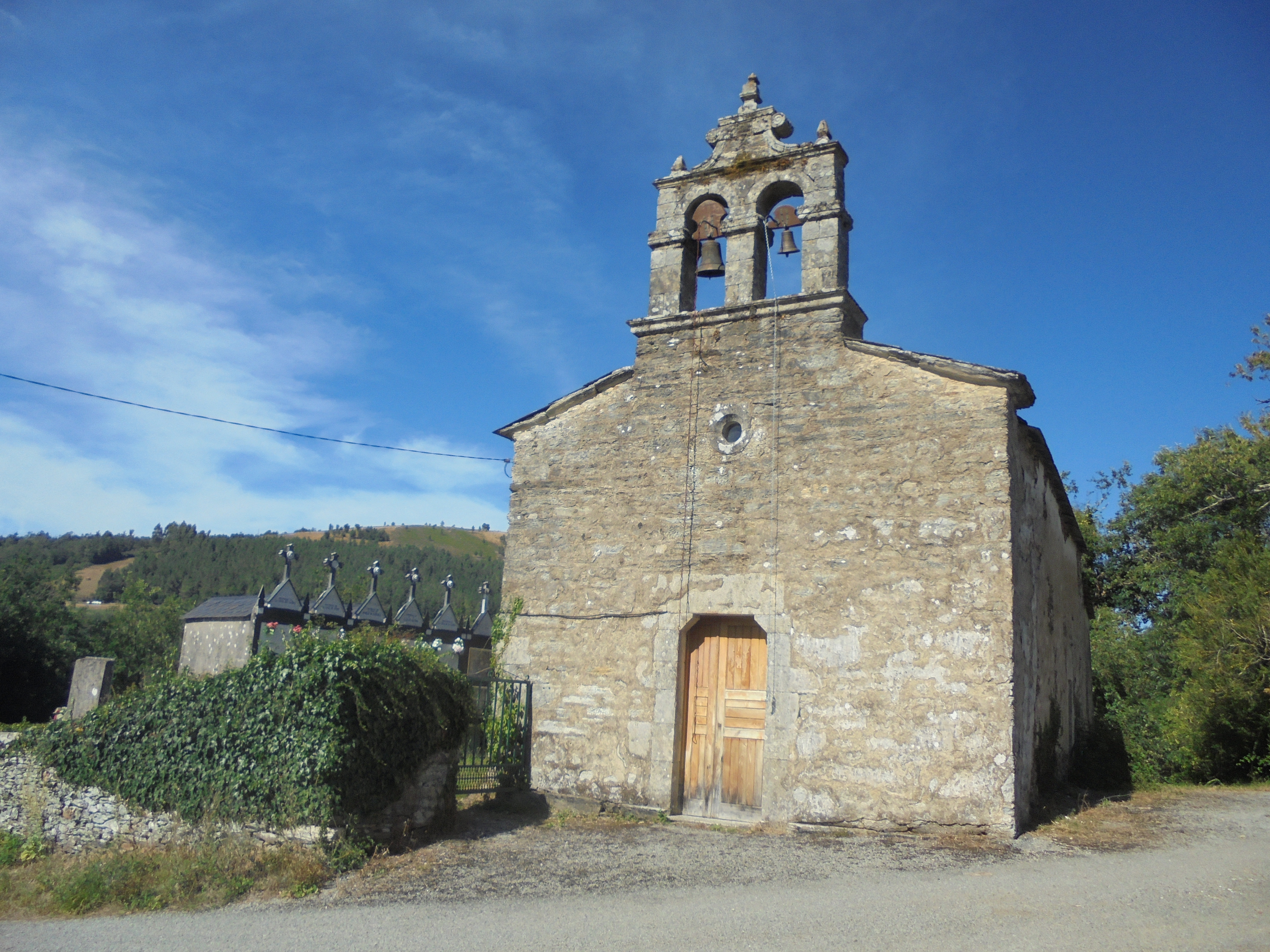 Igrexa parroquial de Laxes